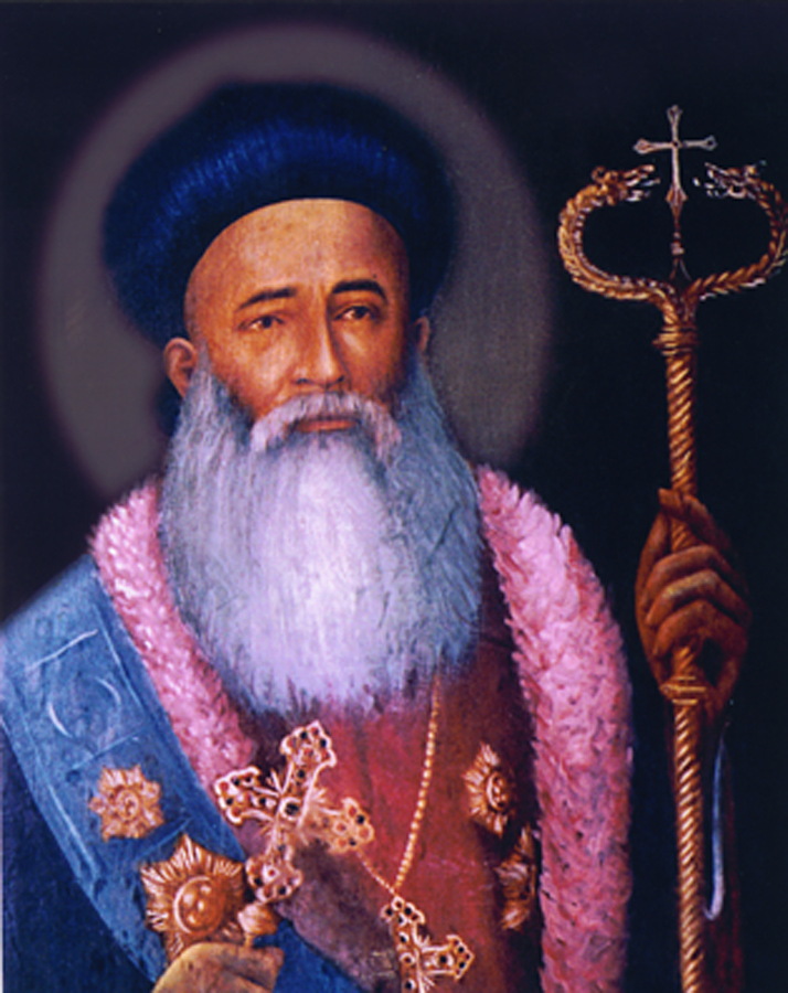 അബ്ദുൽ‍‍ മിശിഹാ രണ്ടാമൻ പാത്രിയർക്കീസ്